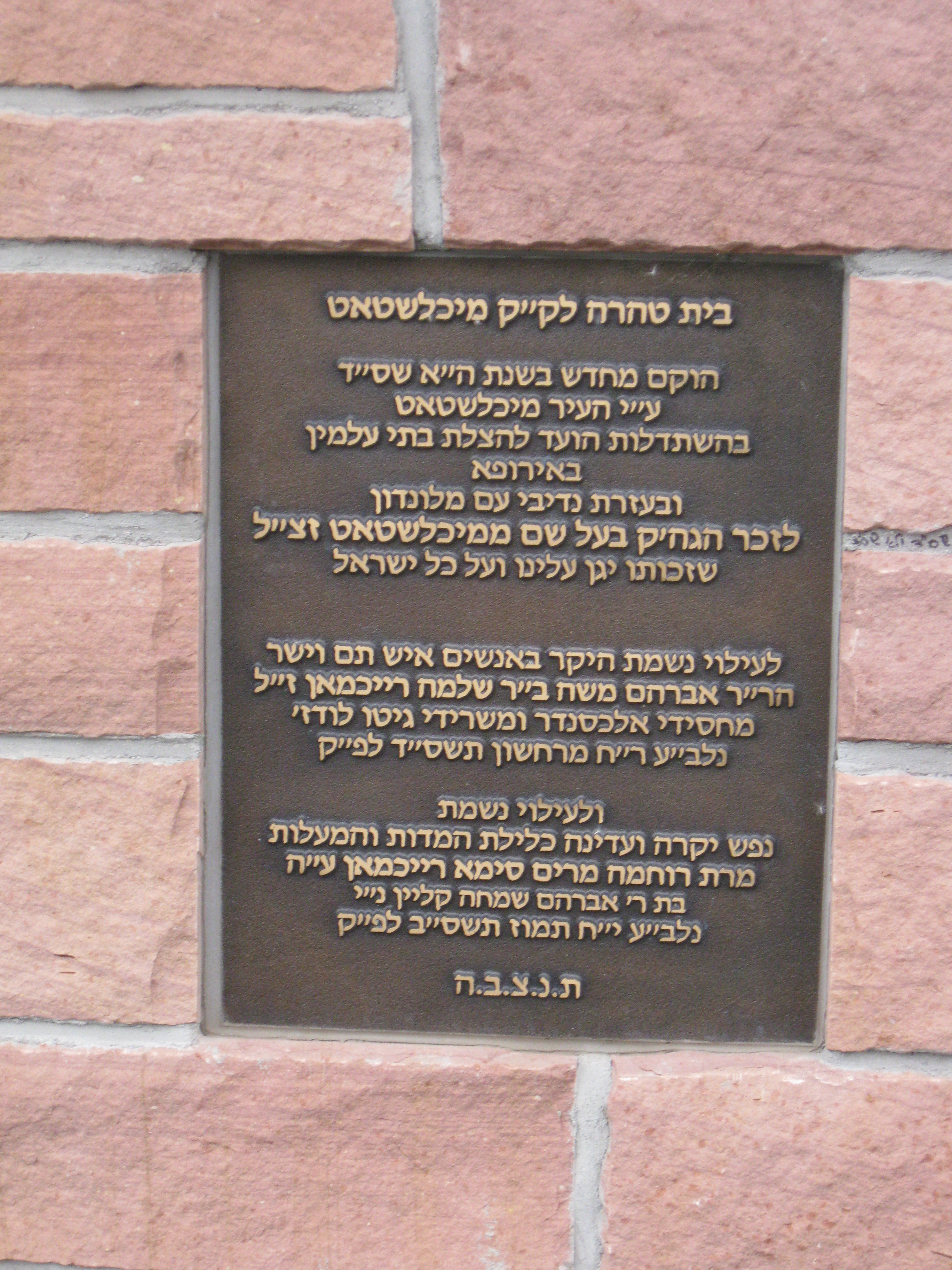 Tafel am Jüdischen Friedhof Michelstadt